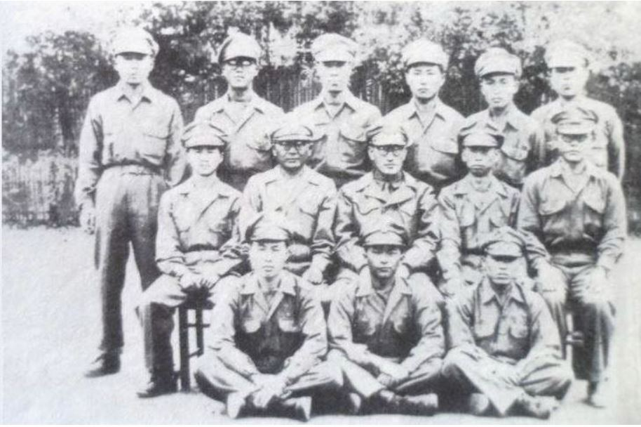 中文（中国大陆）: 李范奭（二排中间）与二支队队员